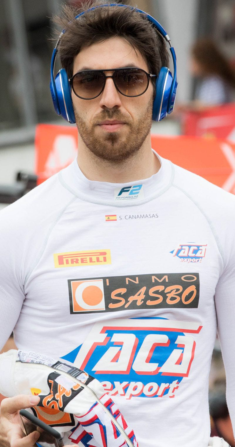 Canamasas en 2017